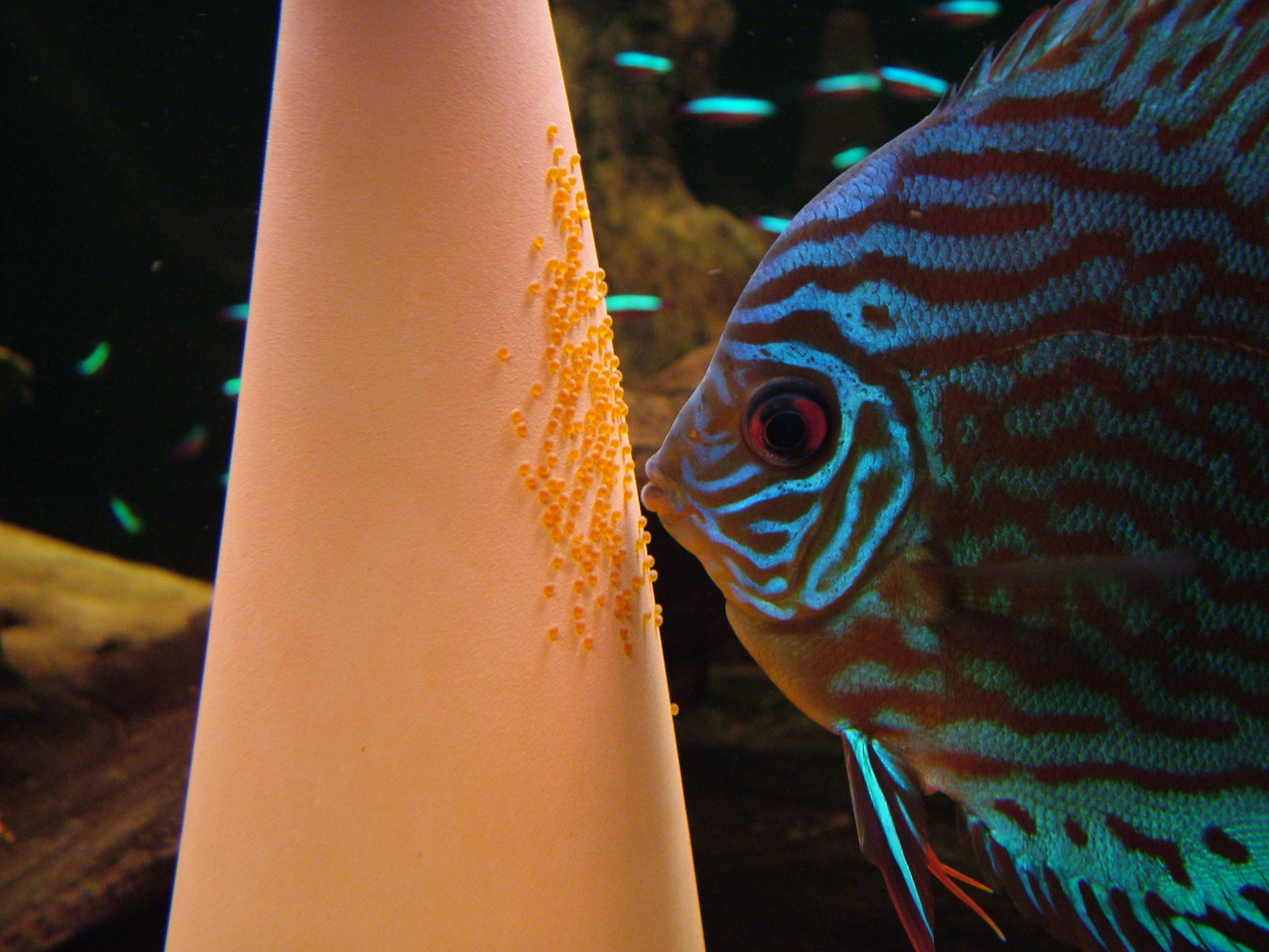 Diskuseier kurz nach dem Legen und Befruchten.